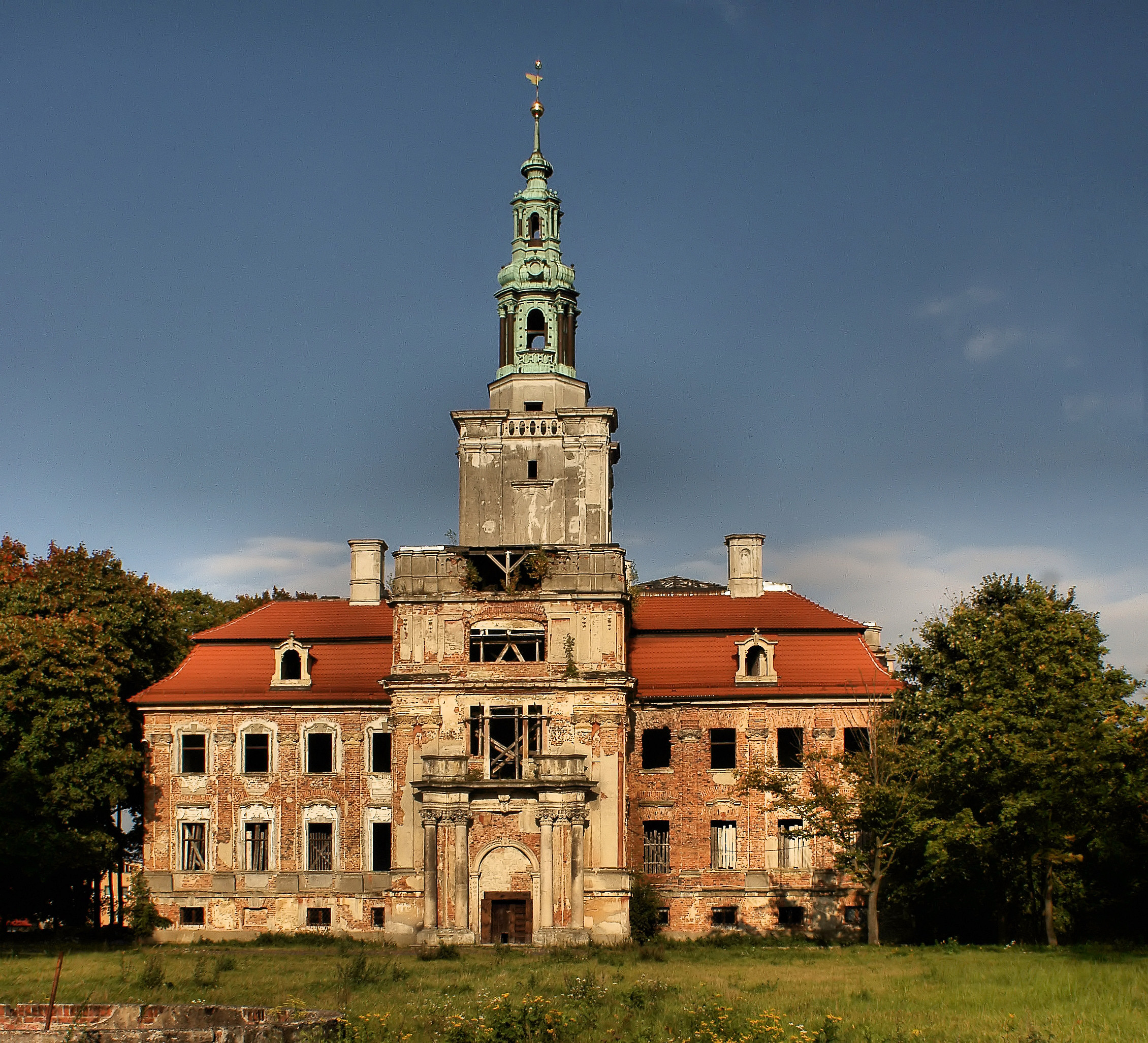 Pałac (ruina) Chocianów, Chocianów